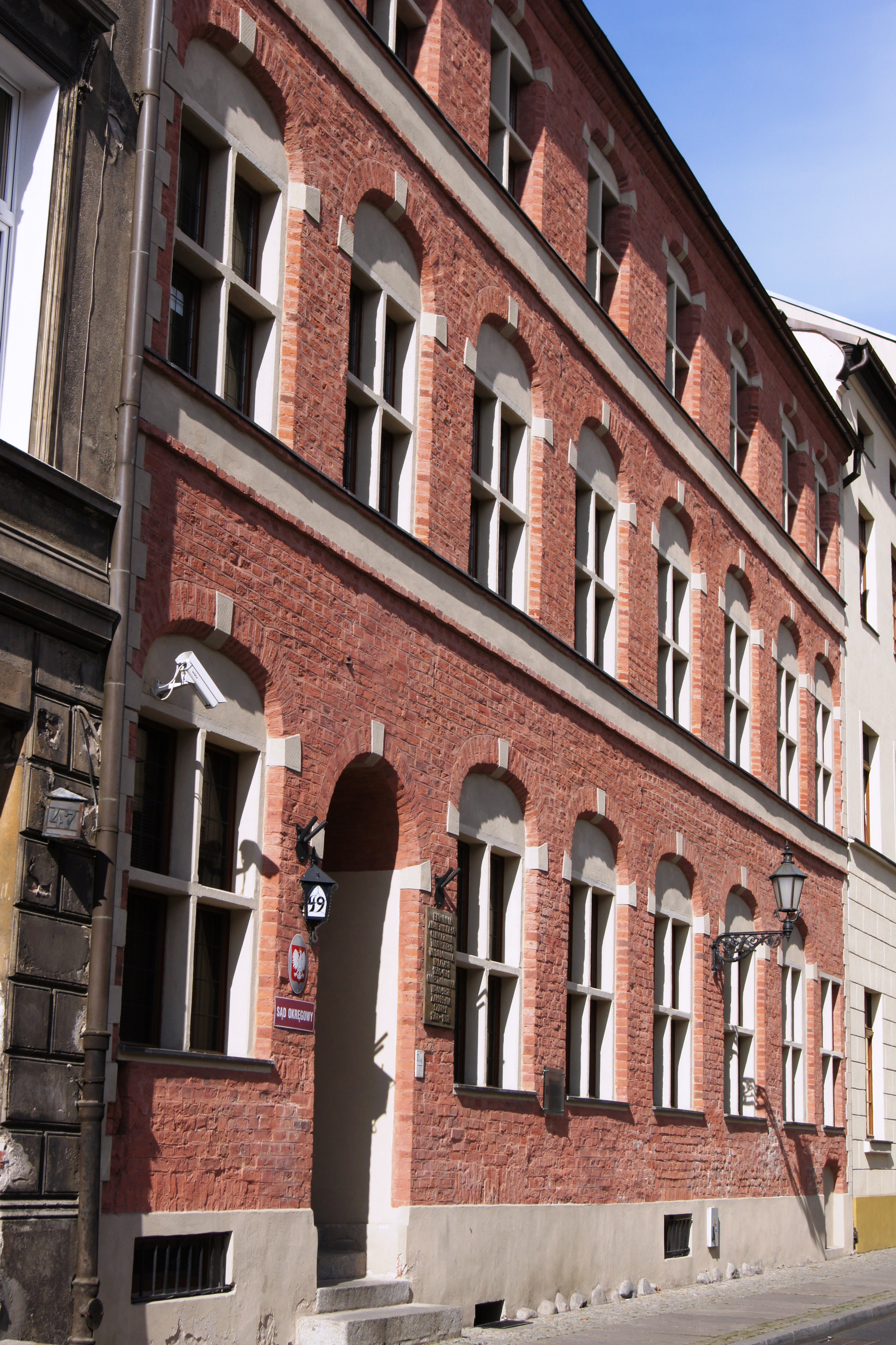 Toruń, ul. Piekary 49 (dawniej 47) - bursa gimnazjum toruńskiego, XIV, 1598-1601 (zabytek nr A/478/273 oraz 46/A)